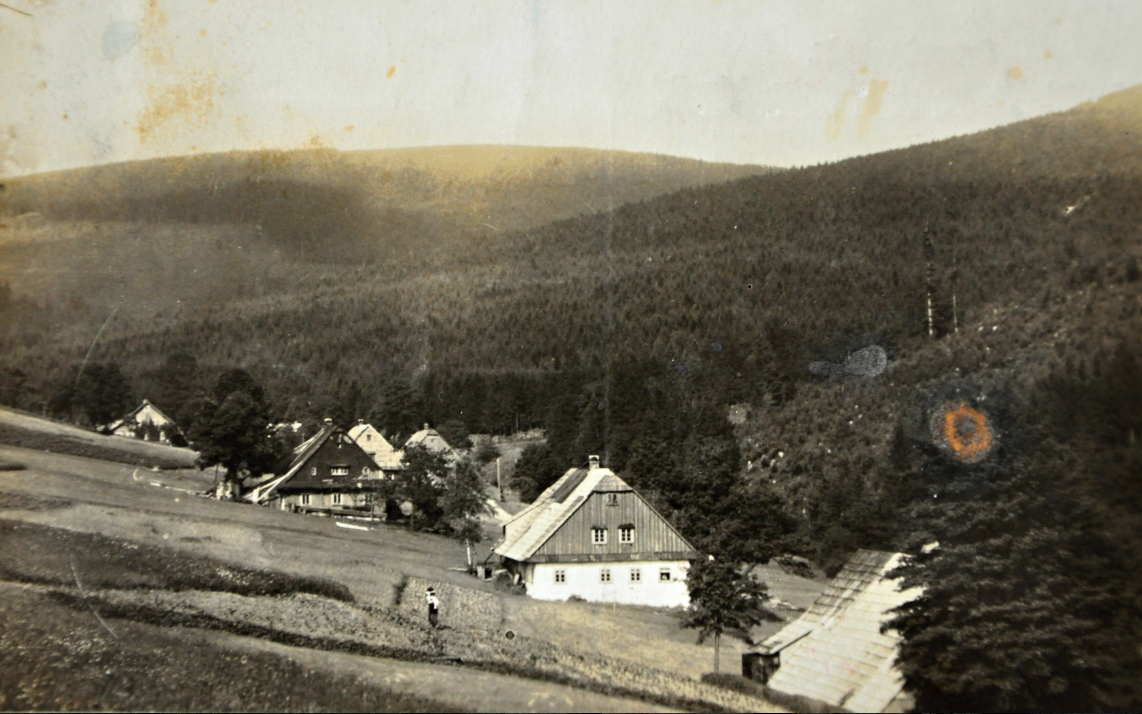 Celkový ohled na osadu Čertův Důl, cca 1930